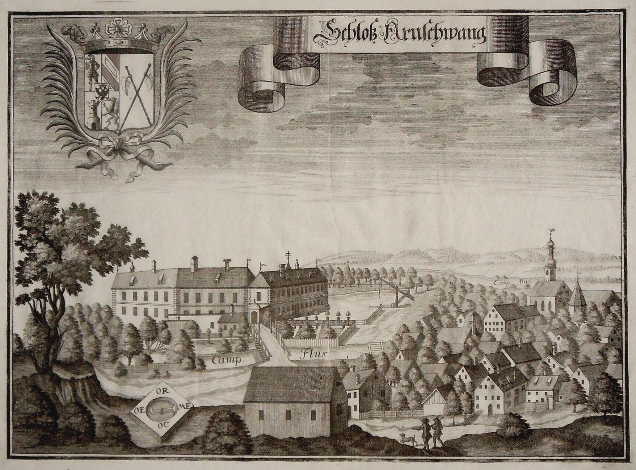 Schloss Arnschwang, Kupferstich von Michael Wening aus dem 18. Jahrhundert